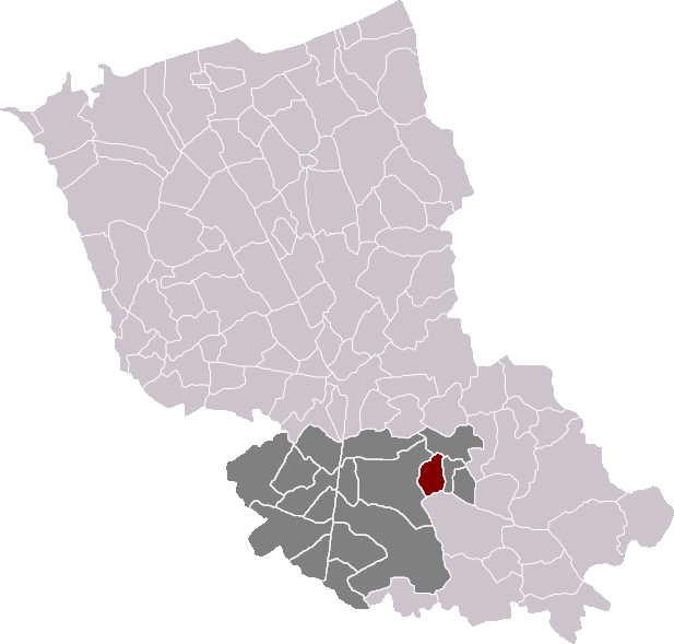 Locatie gemeente Borre in arrondissement Duinkerke. Zelfgemaakt. Location of Borre municipality in the arrondissement of Dunkirk. Self made. Localisation de la commune de Borre dans l'arrondissement de Dunkerque. Fait moi-même.